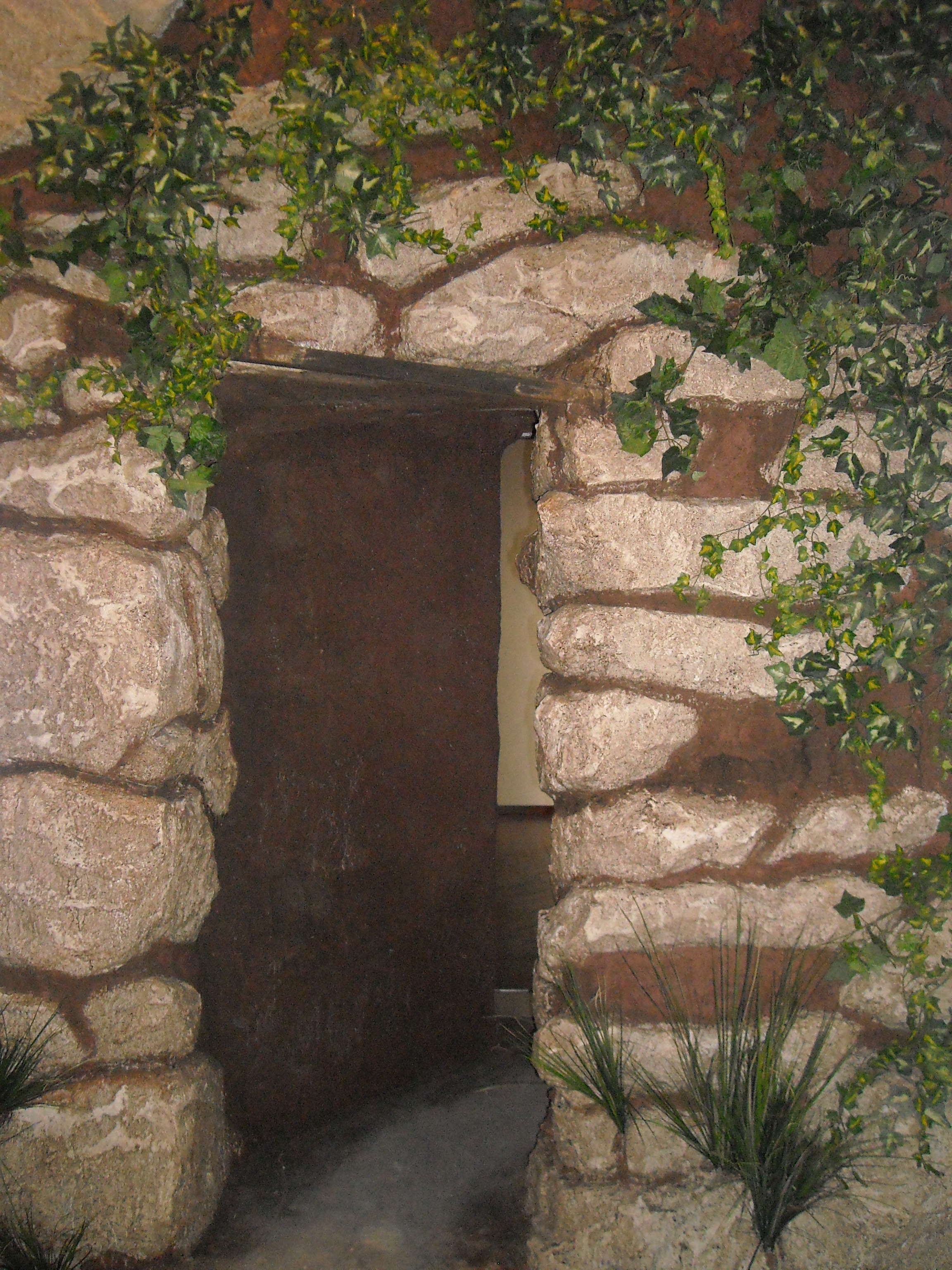 Aspeto da reconstituição de um abrigo